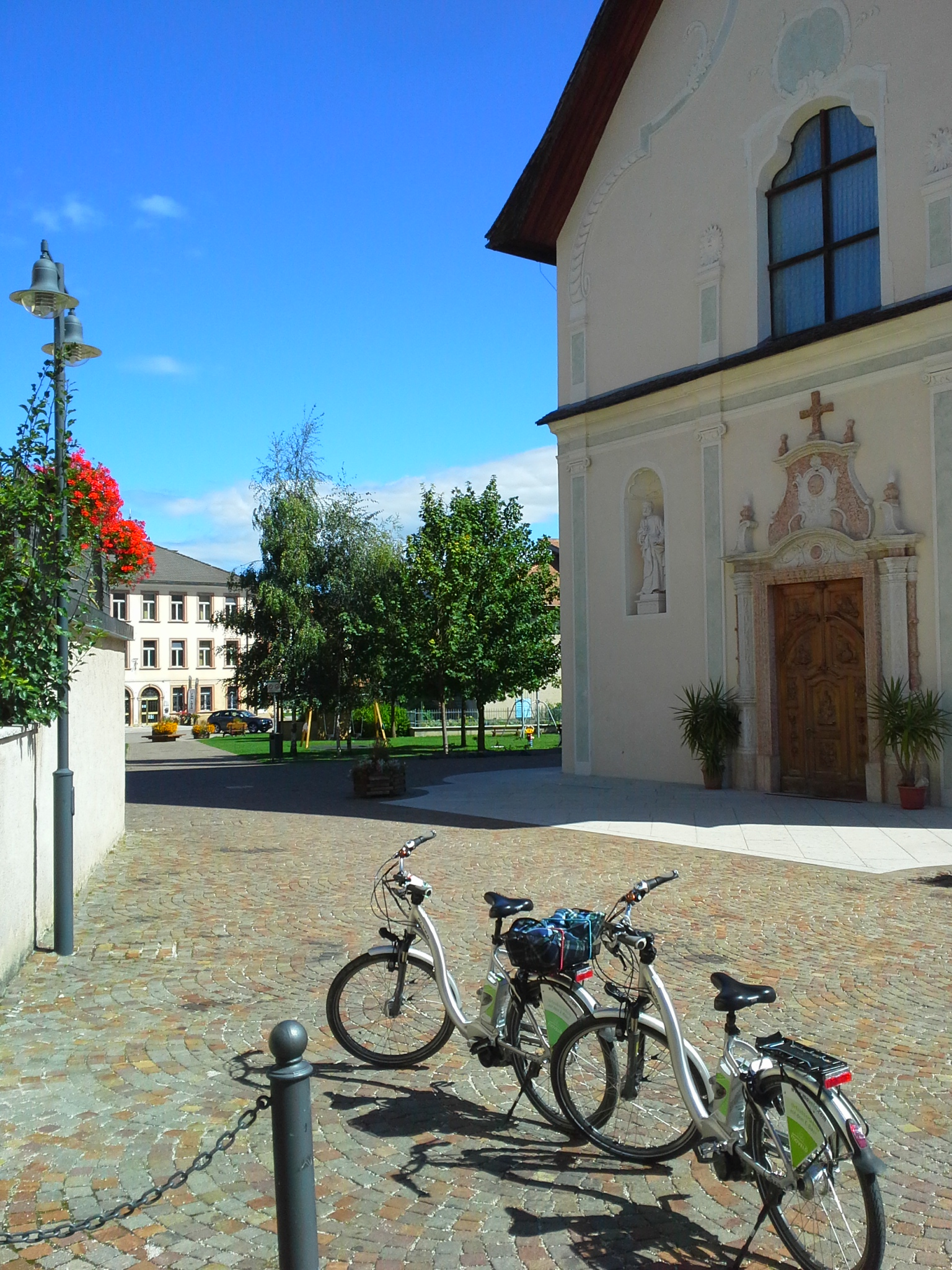 Romeno, Piazza Gian Battista Lampi